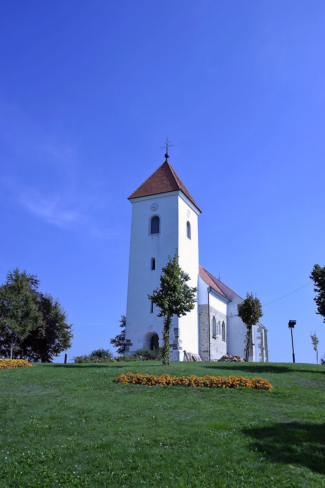 Cerkev Svete Trojice, Gornji Petrovci. Trinity church, Gornji Petrovci. Dreifaltigkeit Kirche, Gornji Petrovci.